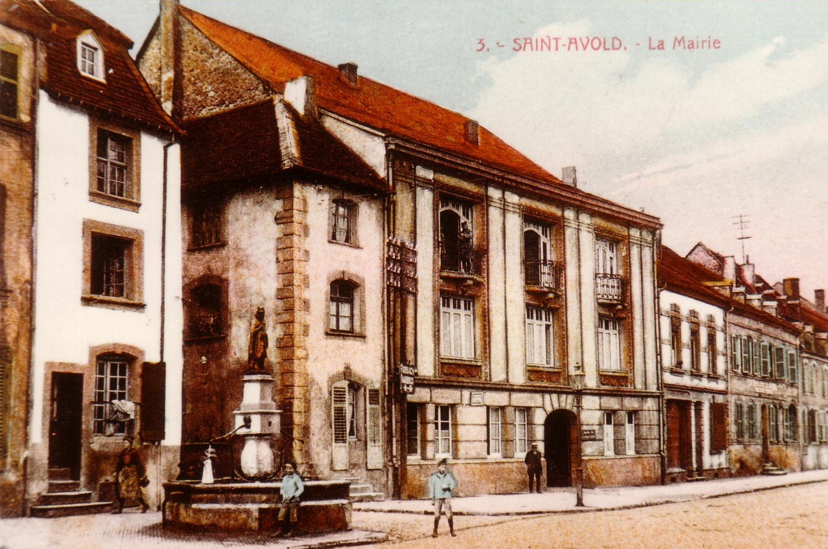 Mairie 1917